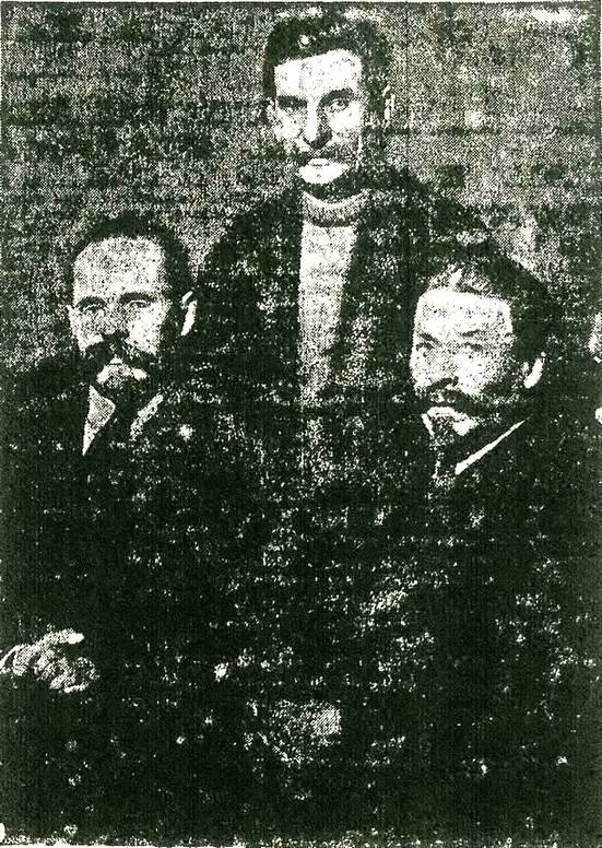 Члены "Собрания русских фабрично-заводских рабочих Санкт-Петербурга" С. В. Кладовиков, А. С. Семёнов и В. Маслов.